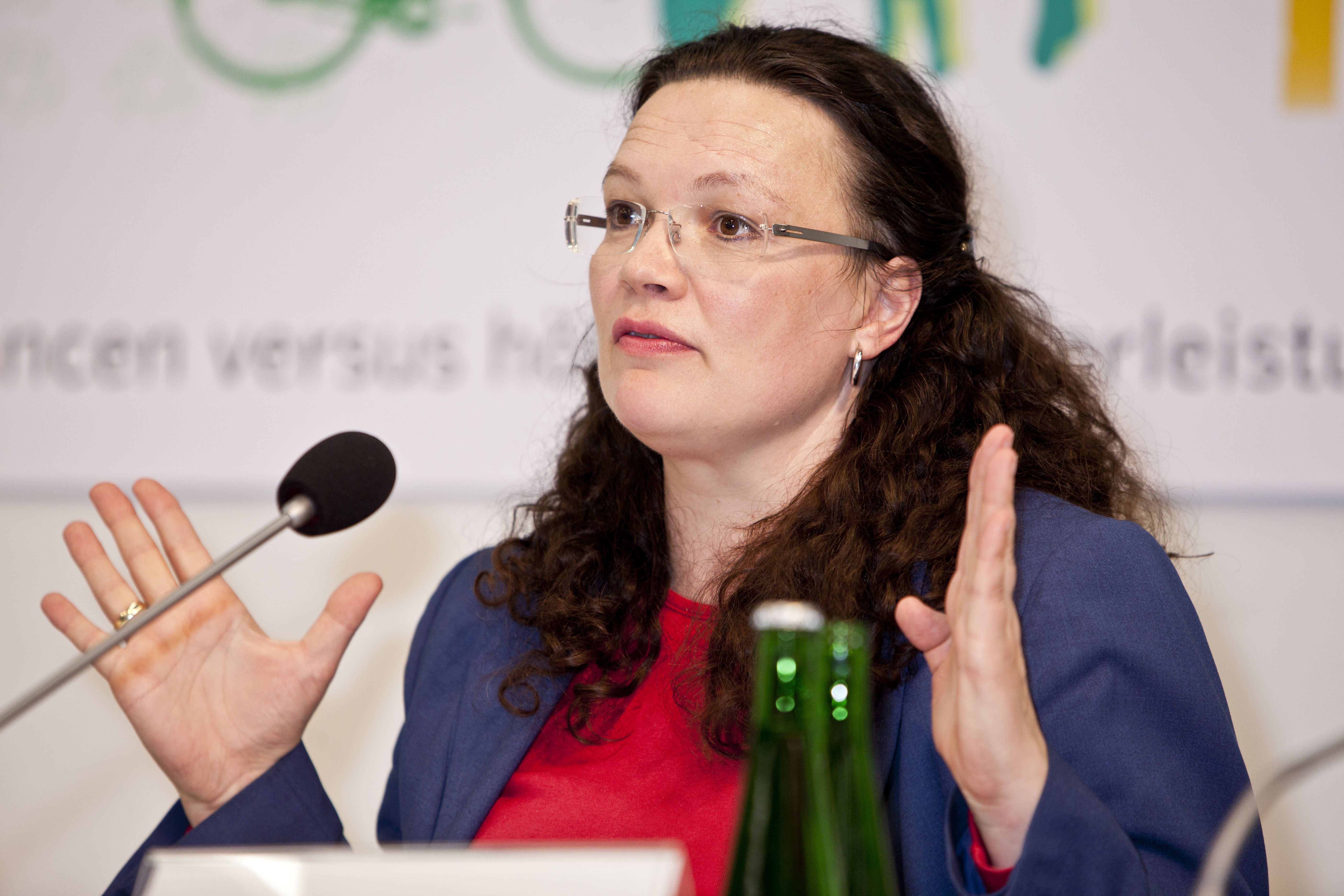 Foto: Neumann und Rodtmann